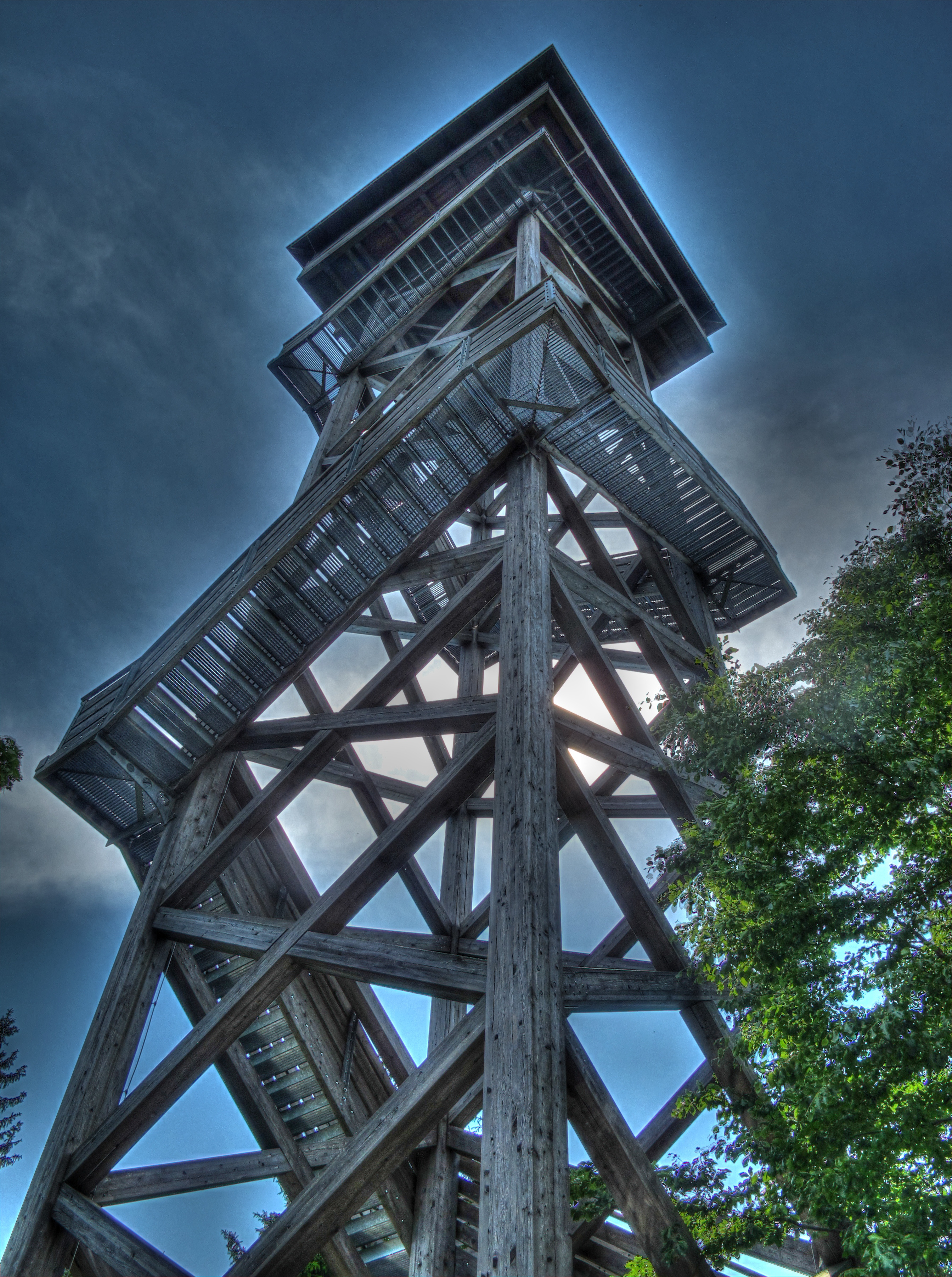 Deutschland, Bayern, Oberpfalz, Gemeinde Tirschenreuth, Oberpfalzturm im Steinwald